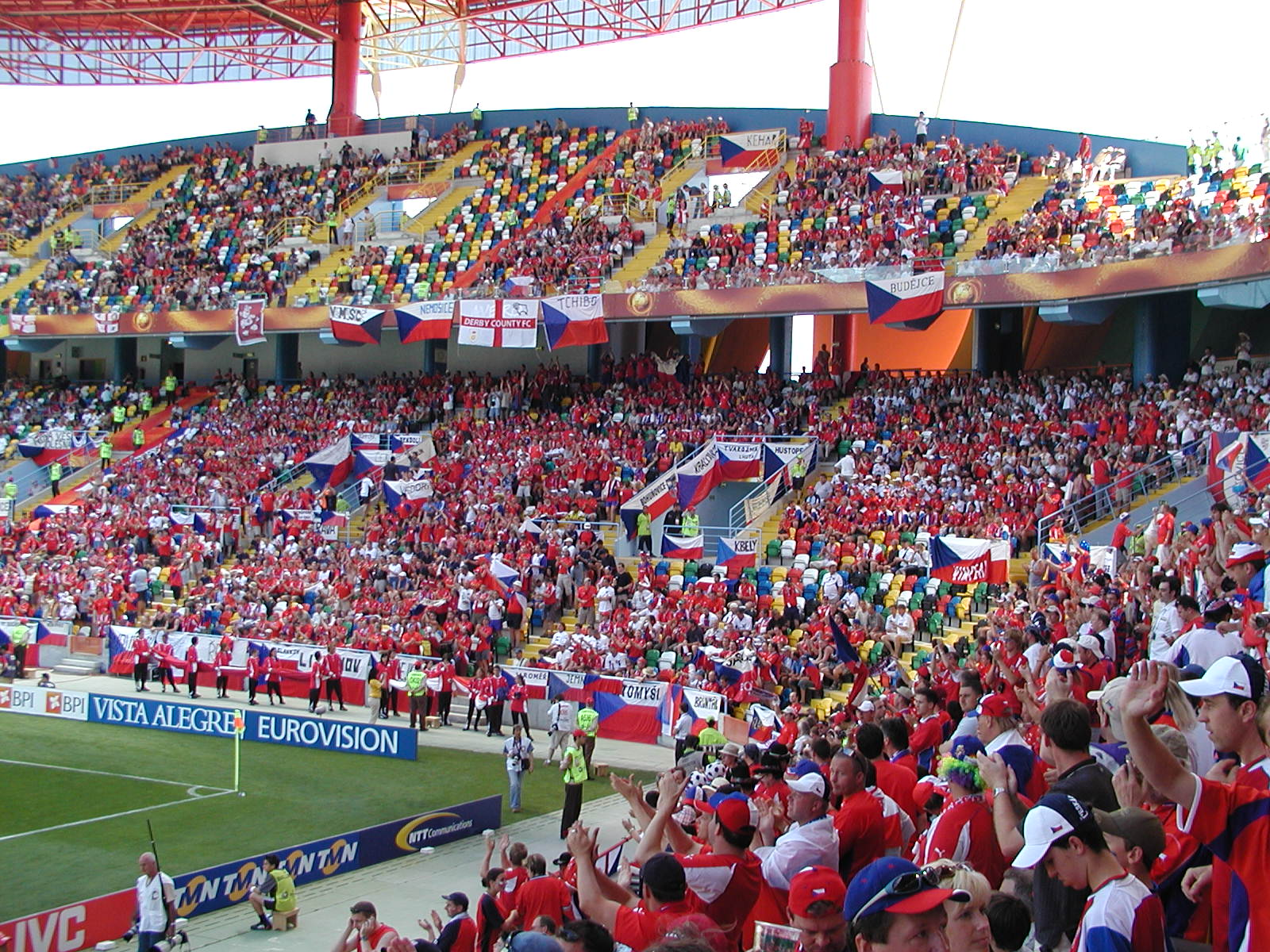 own work, StaraBlazkova 2004